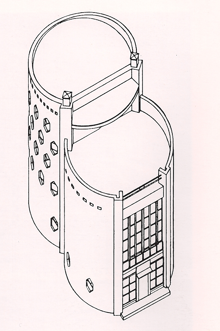 Аксонометрия Дома Мельникова в Кривоарбатском переулке